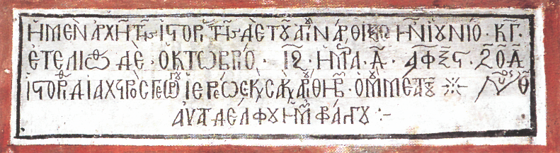 Монастир Святого Варлаама